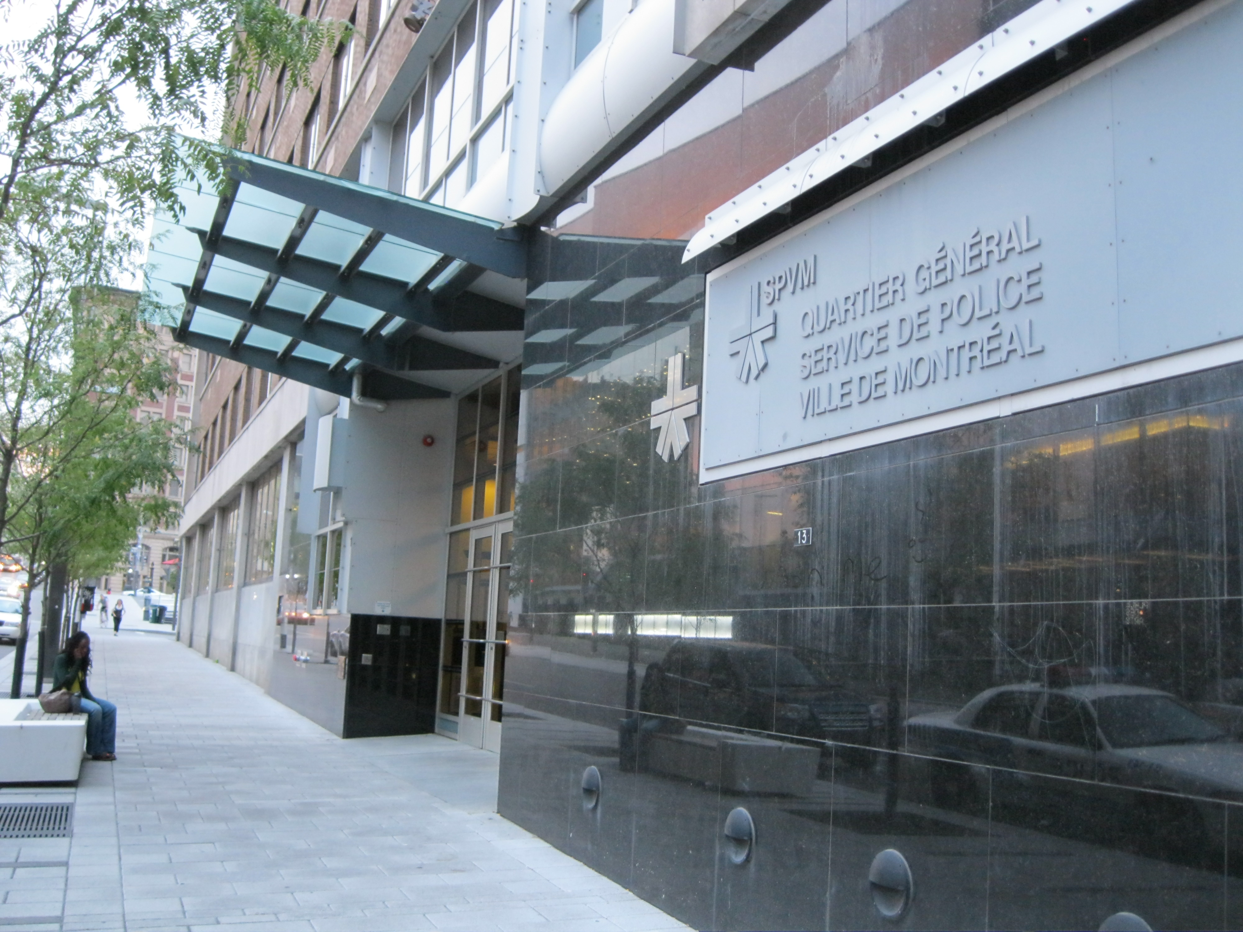 Quartier général - Service de police de la Ville de Montréal - 1441, rue Saint-Urbain, Montréal (Québec)